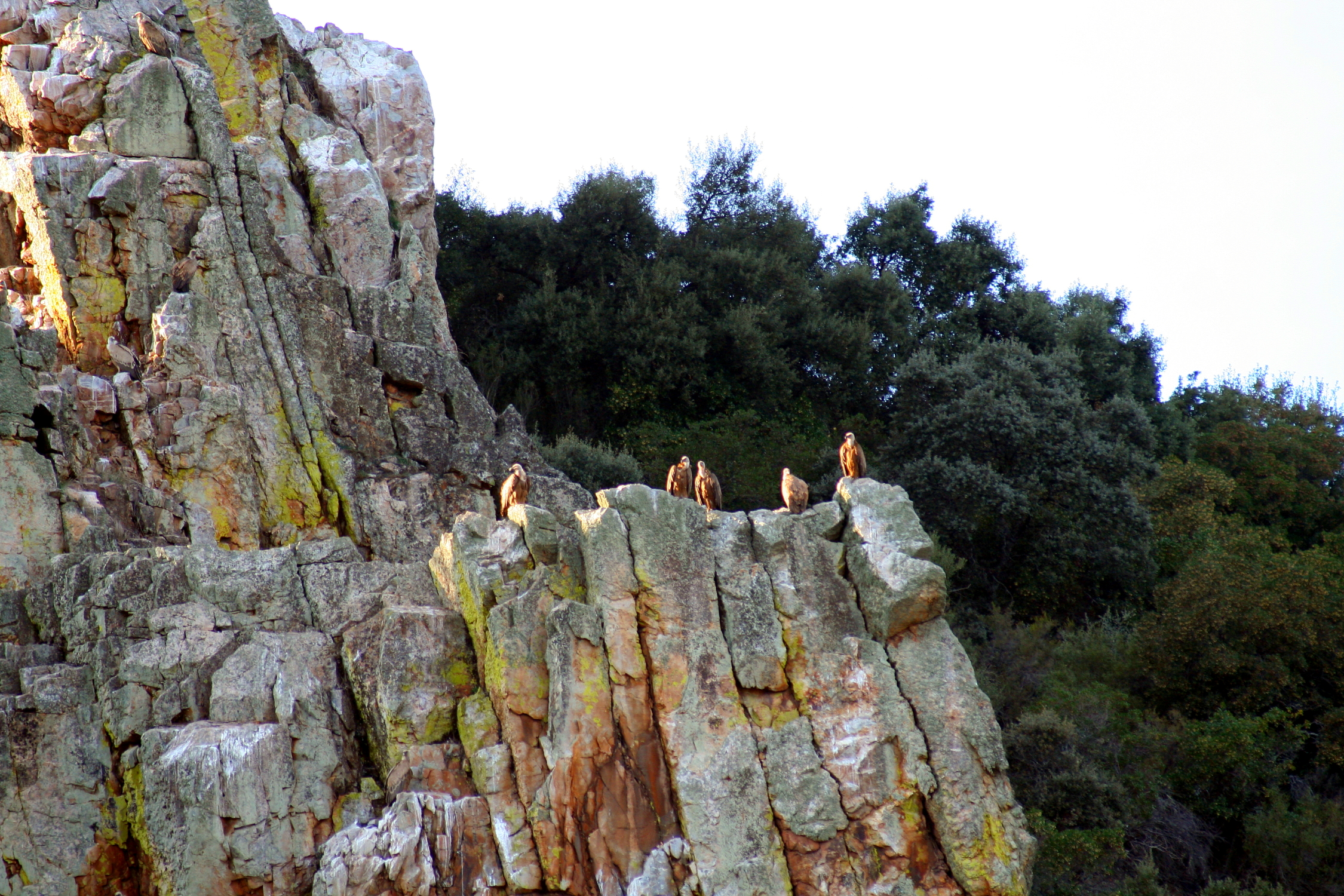 Gyps fulvus en el Parque Nacional de Monfragüe, Cáceres, Extremadura, España.